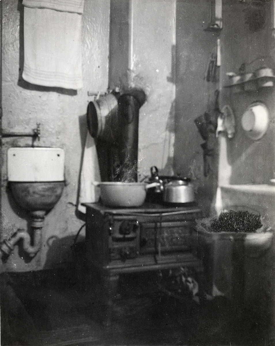 Kjøkken i arbeiderbolig - ca. 1930